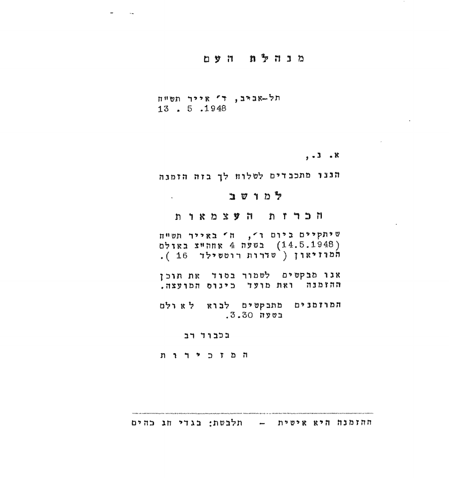 הזמנה למושב הכרזת העצמאות של מנהלת העם שלמה קדר